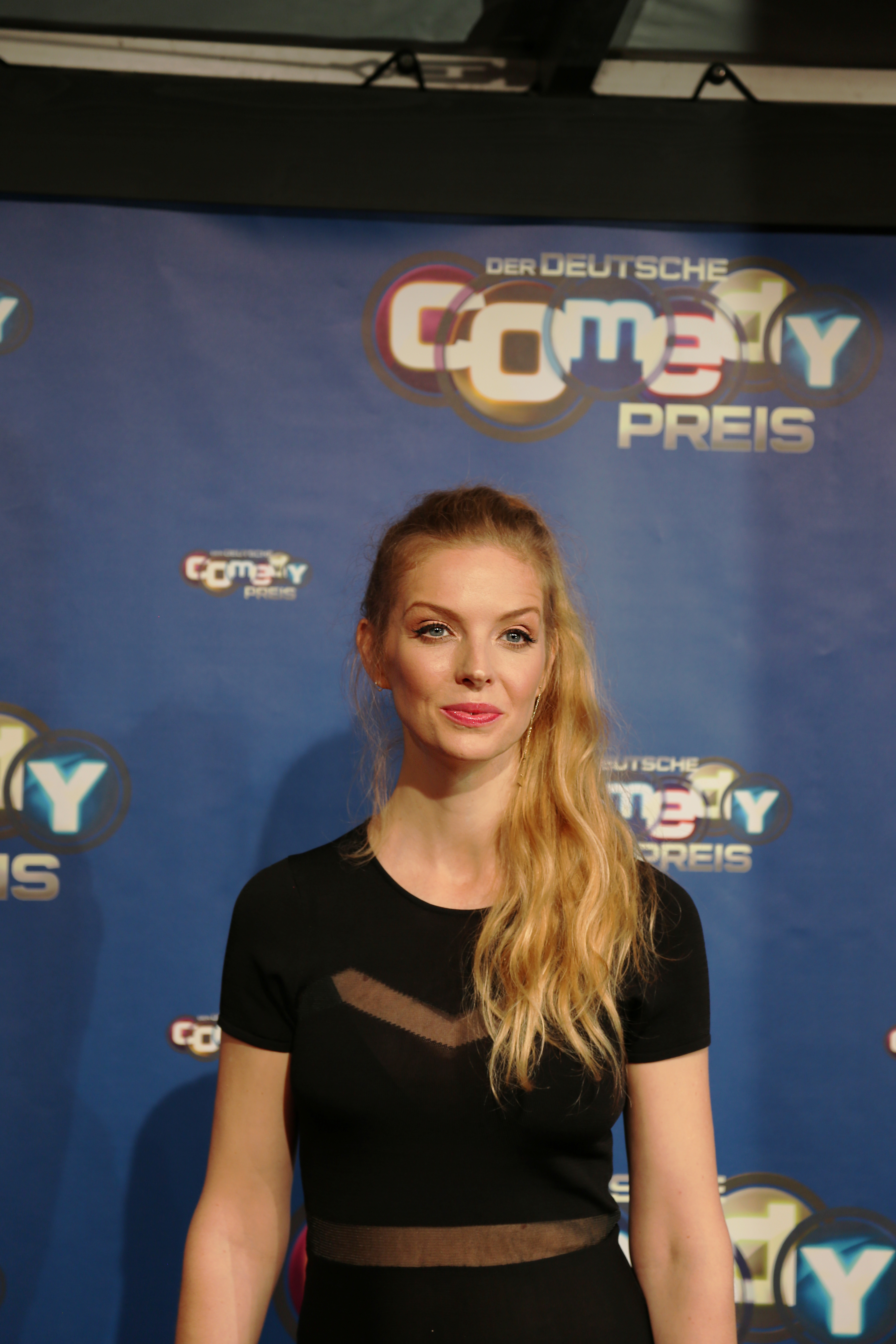 Pheline Roggan beim Deutschen Comedypreis 2017.